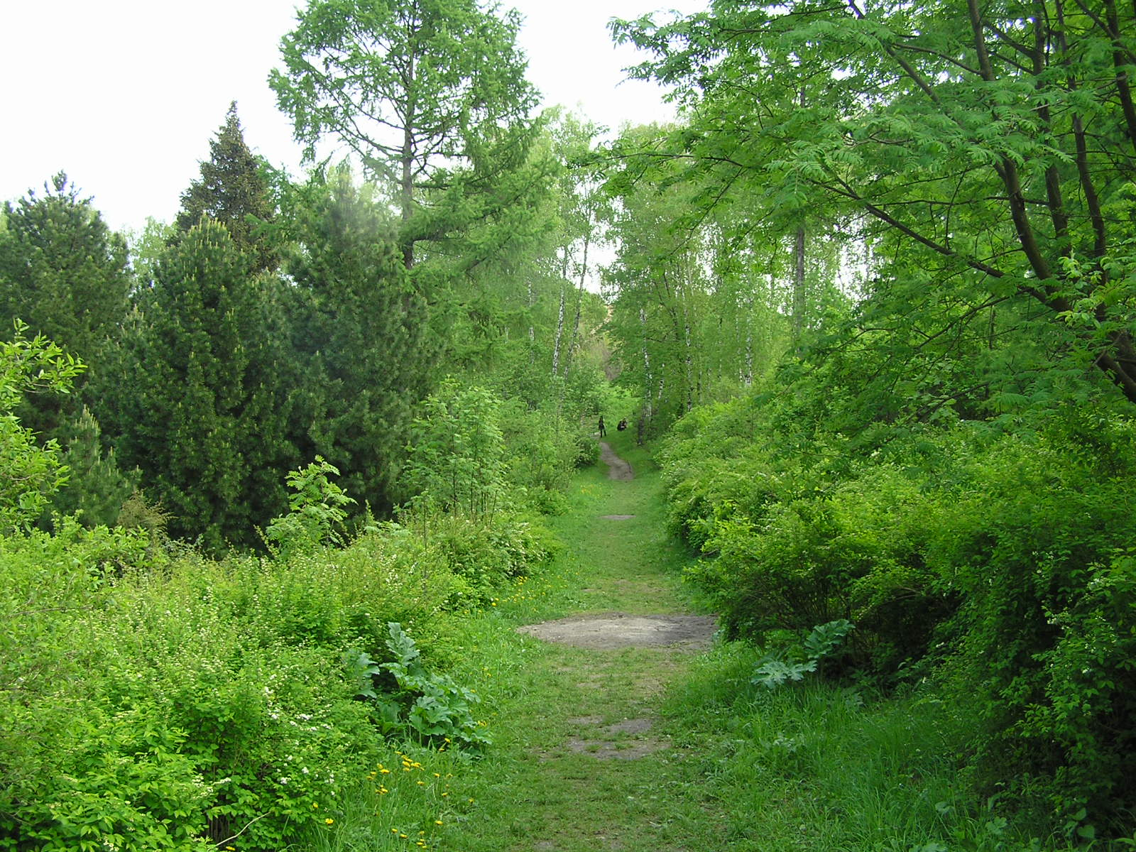 Національний ботанічний сад ім. М.Гришка, Печерський район